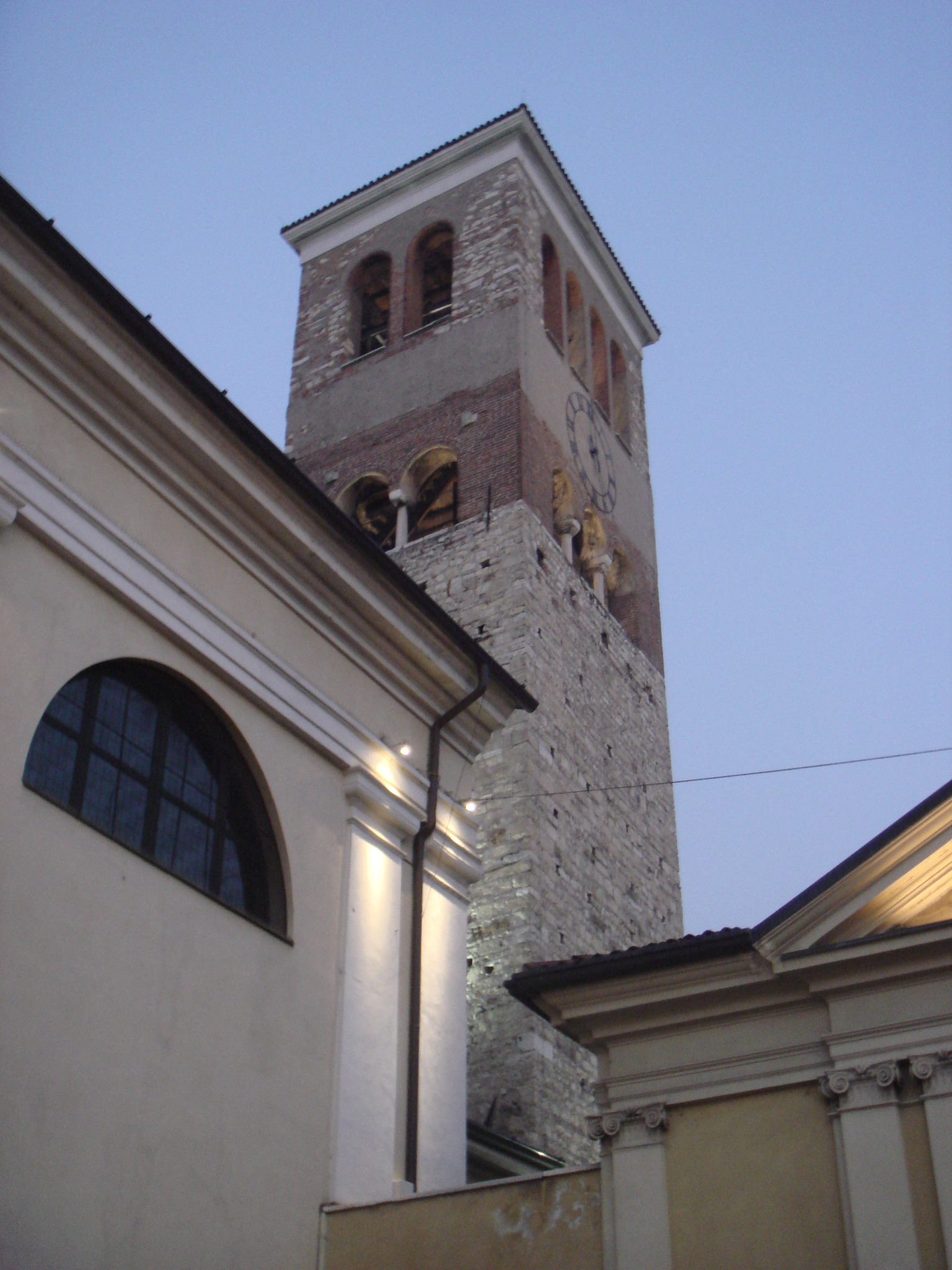 San Faustino maggiore. Campanile, probabilmente ricavato da un torrione difensivo.